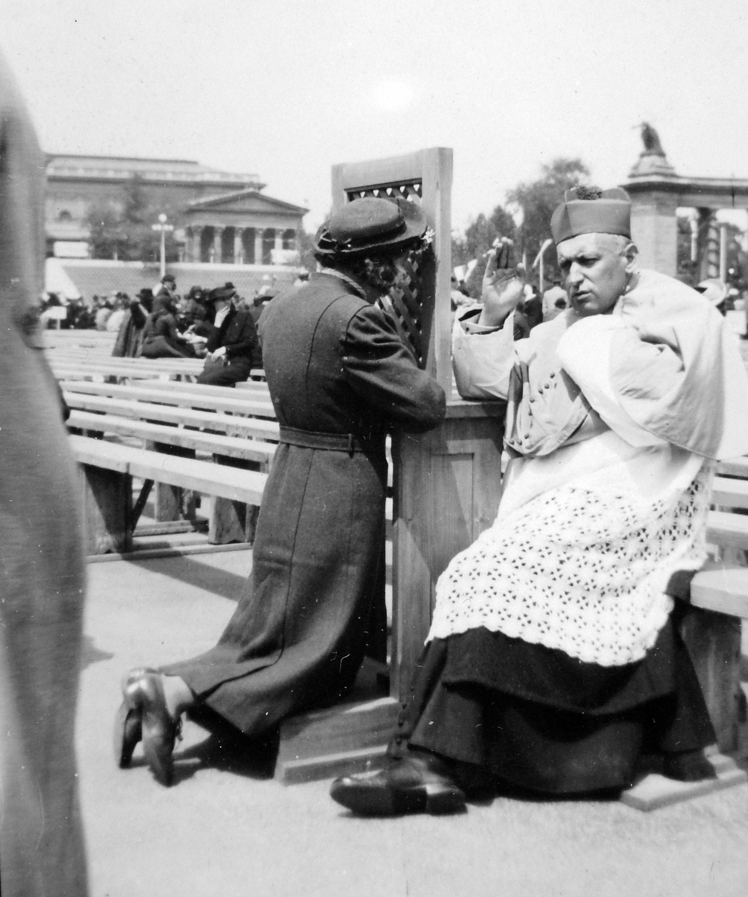 Hősök tere, Eucharisztikus Világkongresszus. Mindszenty József gyóntat. (1938)